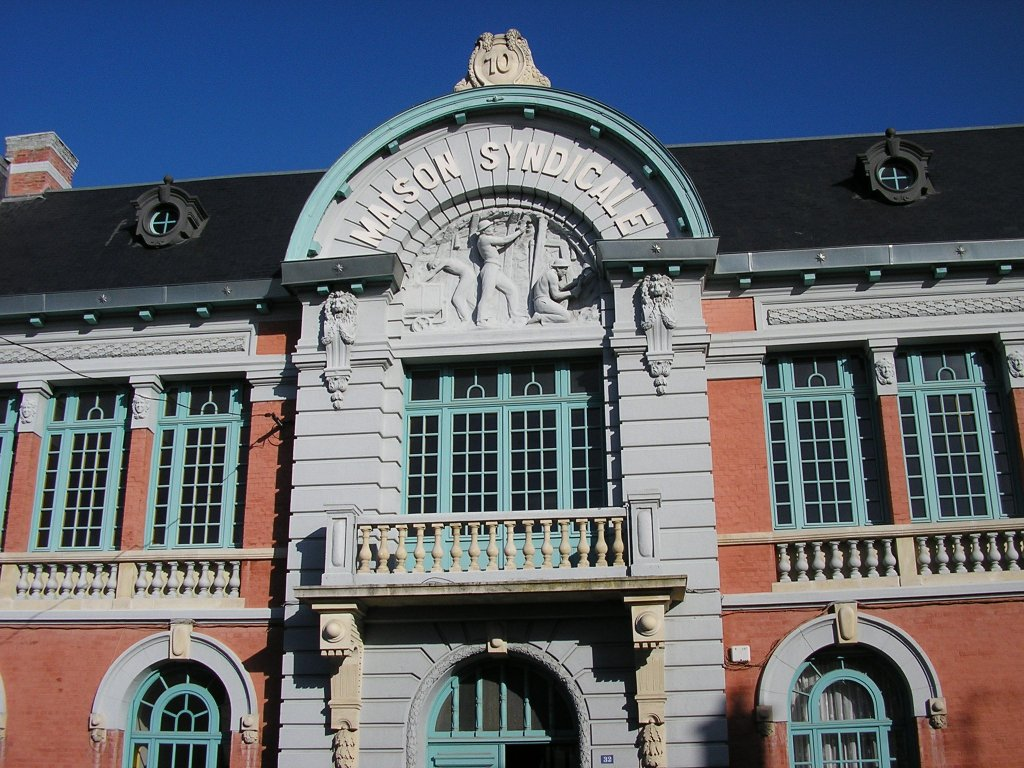 Maison syndicale des mineurs de la Compagnie des mines de Lens, Lens, Pas-de-Calais, Nord-Pas-de-Calais, France. La maison syndicale est inscrite sur la liste du patrimoine mondial par l'Unesco le 30 juin 2012 et y constitue le site no 66.